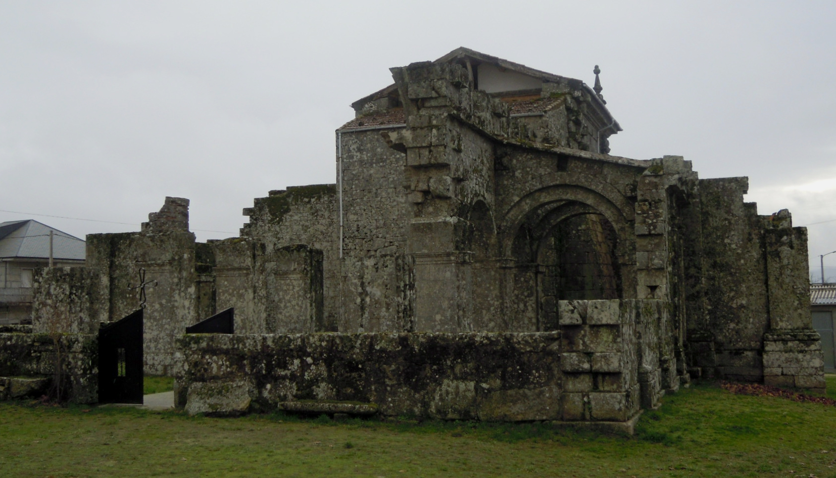 Santuario dos Miragres, en Couso de Salas (Muíños).